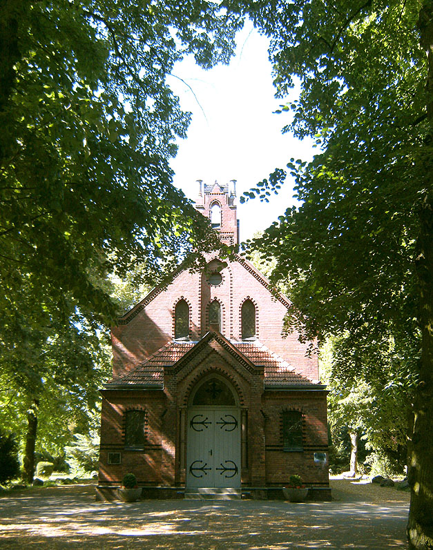 Kapelle Friedhof zum Heiligen Kreuz, Mariendorf 1894. Architekt Gustav Erdmann, Foto: L. Wekenborg